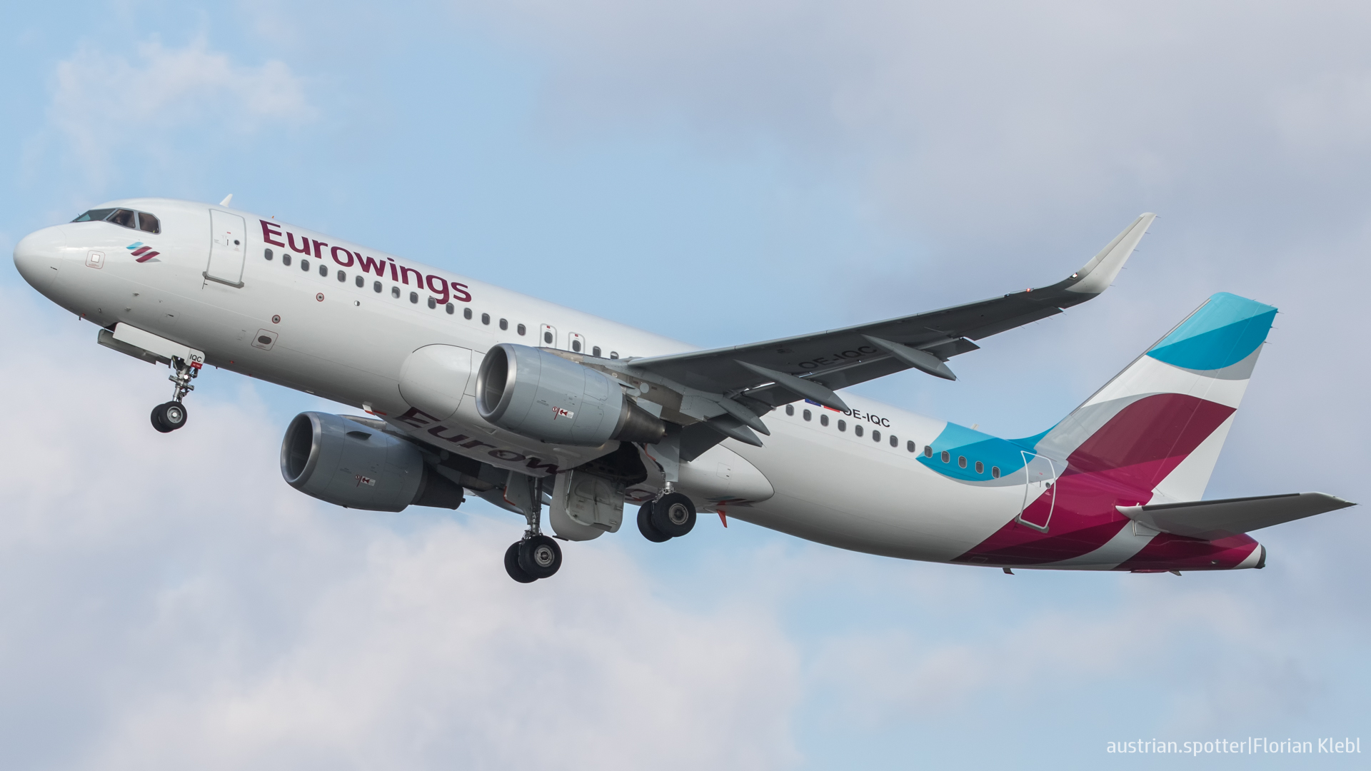 Vienna Airport 13.3.2017